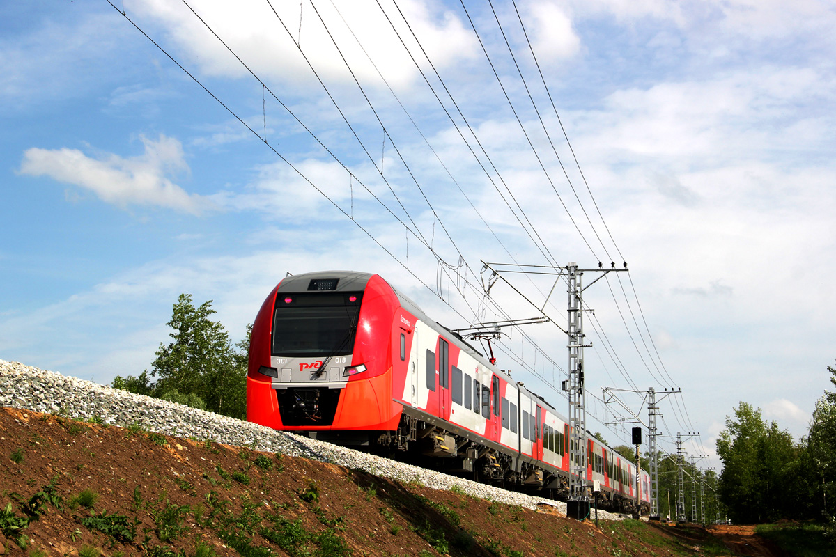 ЭС1-018 между станциями Тихорецкая и Комбинат